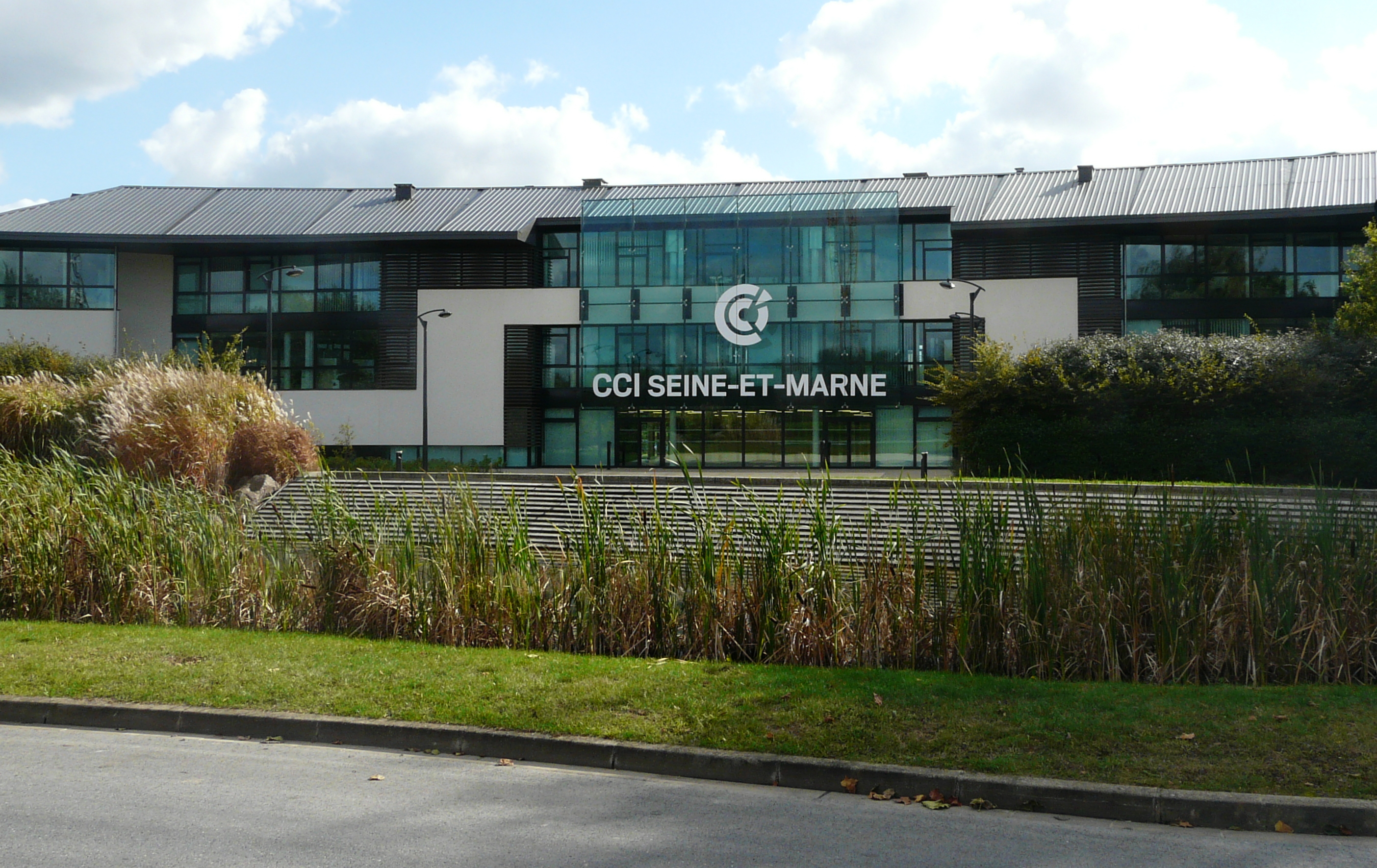 Siège de la CCI Seine-et-Marne